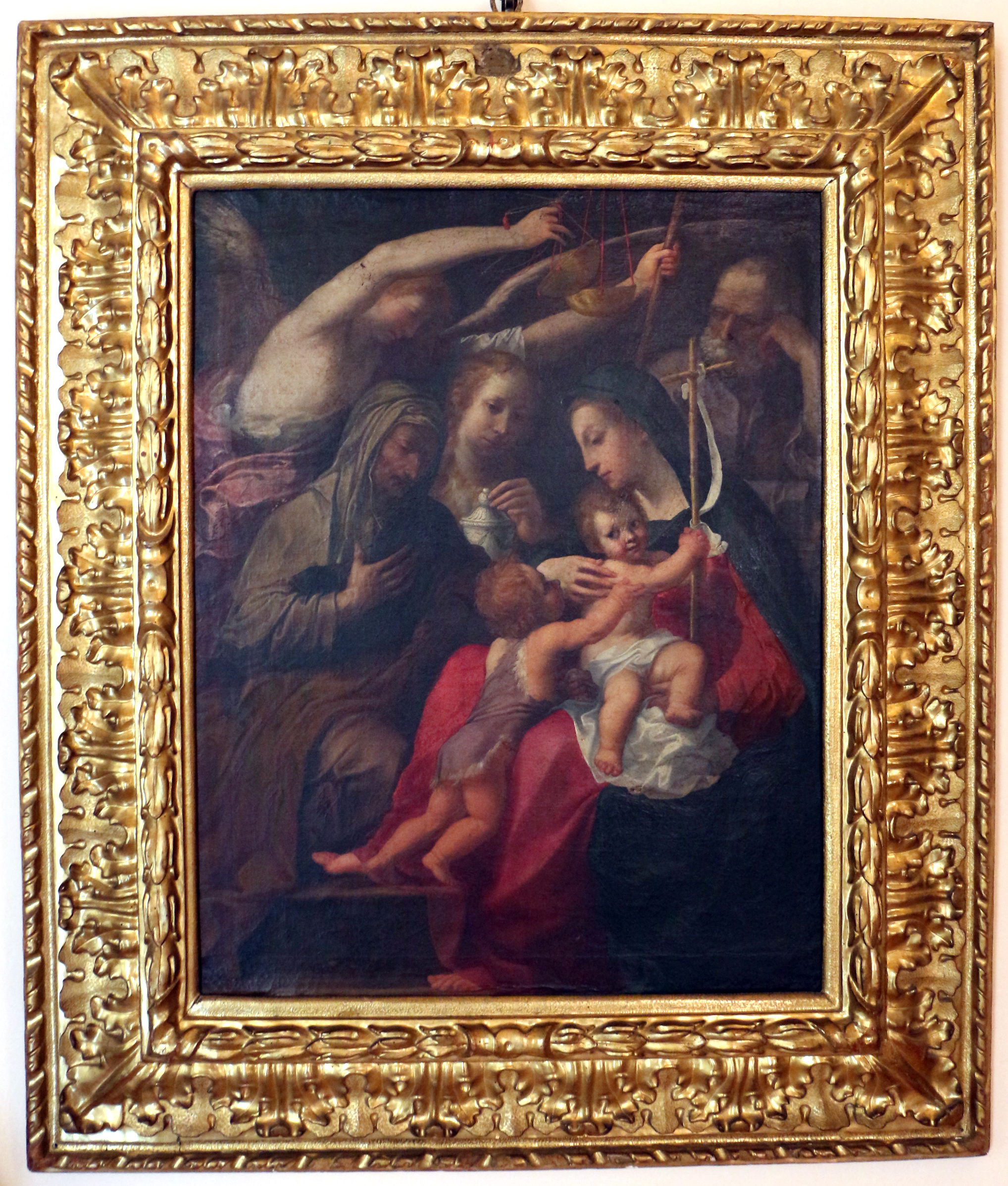 Pinacoteca Nazionale di Bologna in Palazzo Pepoli Campogrande This is a photo of a monument which is part of cultural heritage of Italy.